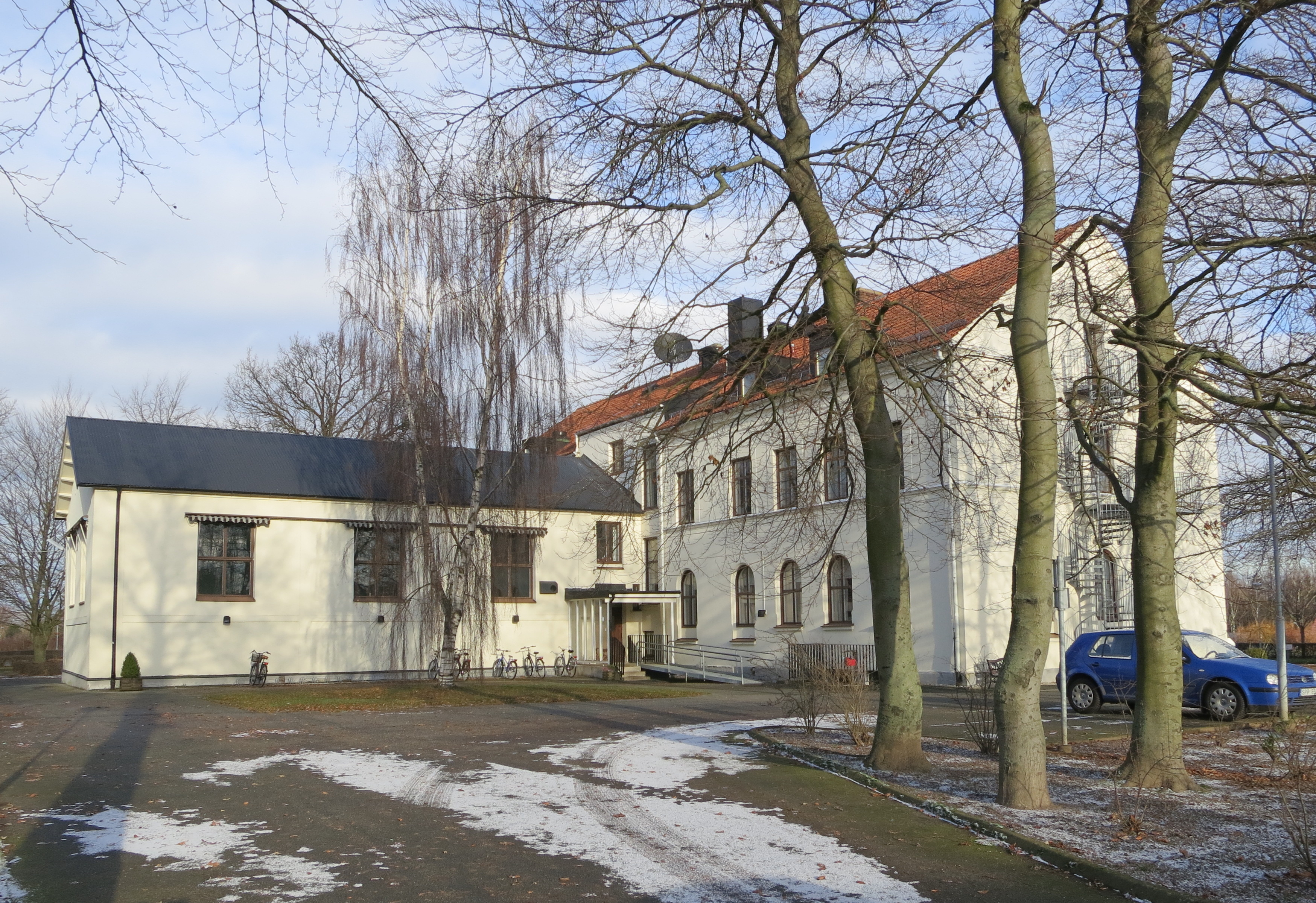 Österlens folkhögskola i Tomelilla